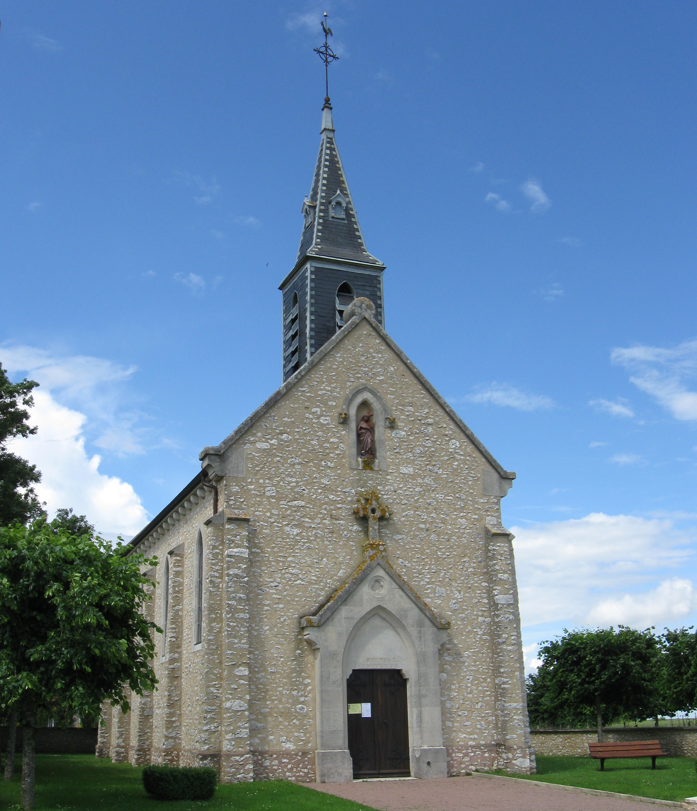 Église Sainte-Marie-Madeleine de Bezalles. (Seine-et-Marne, région Île-de-France).